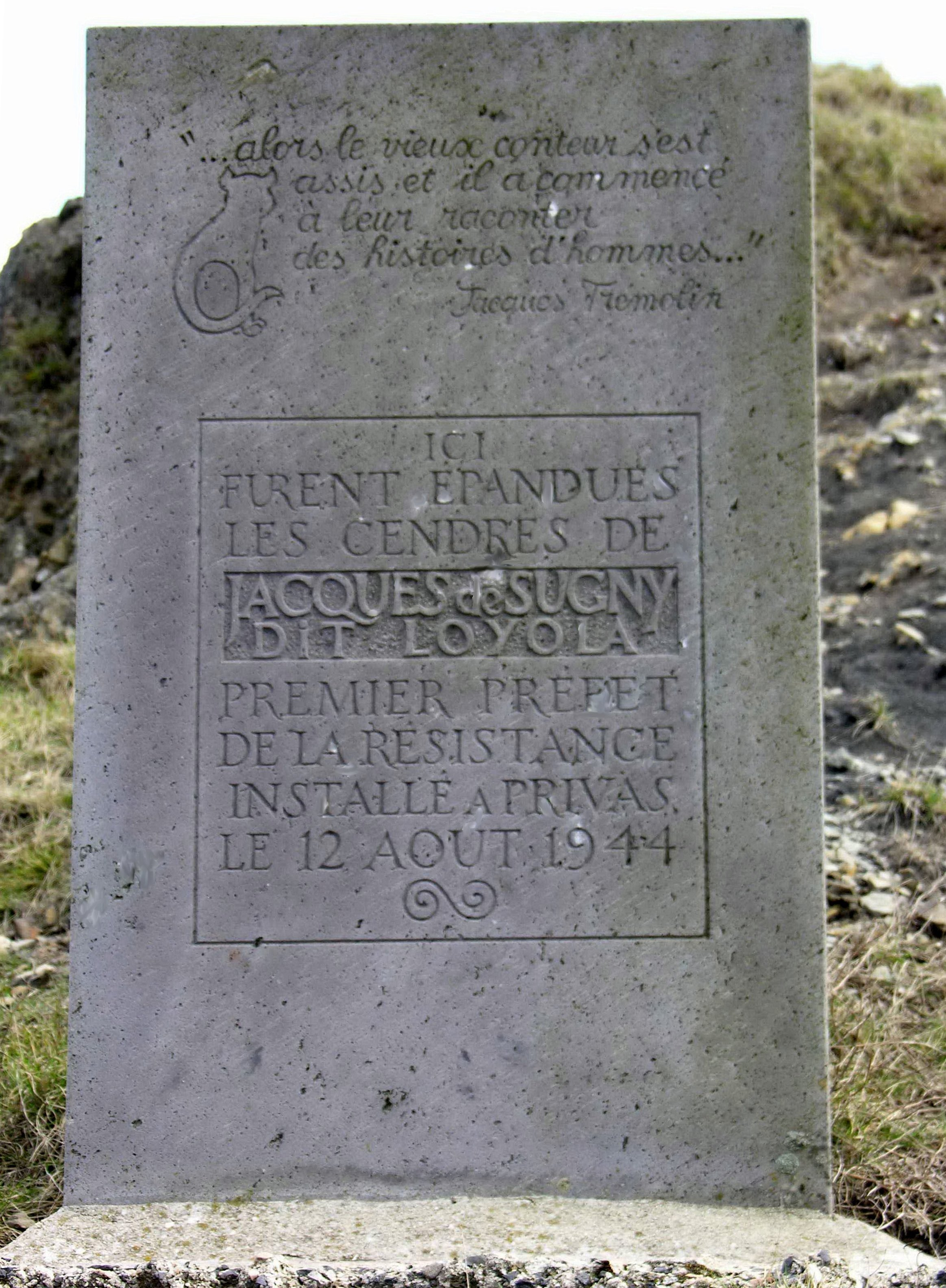 Stèle à la mémoire de Jacques de Sugny, dit Loyola. Photo Séraphin lampion